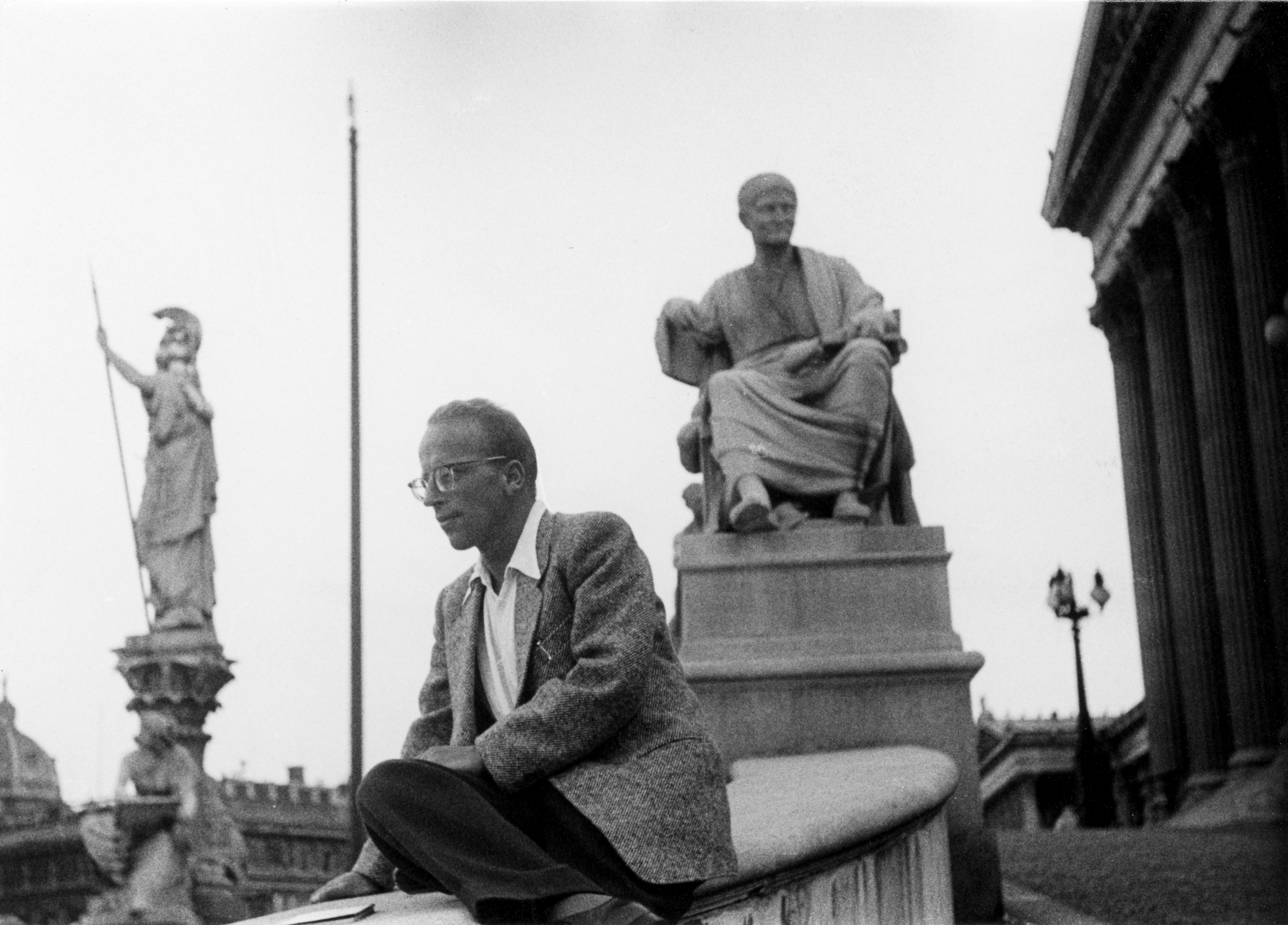 Karl Fischer im Juni 1955 vor dem Wiener Parlament. Originalfoto in Privatbesitz von Dnalor_01; Aufnahme von Dipl. Ing. Konstantin Jawecki, Onkel von Dnalor_01.